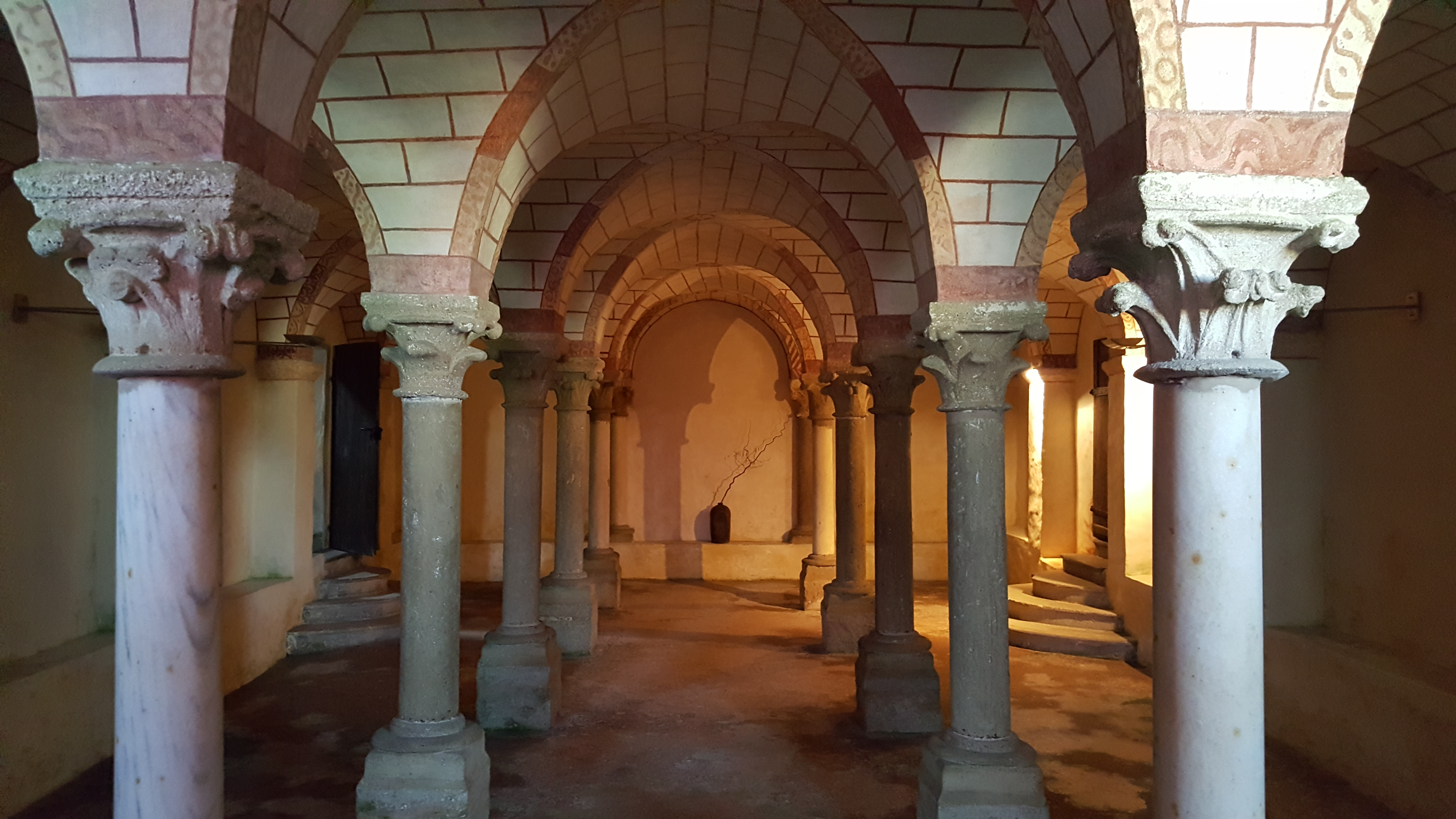 Die Krypta in Stift Ardagger fotografiert vom Altar Richtung Westen